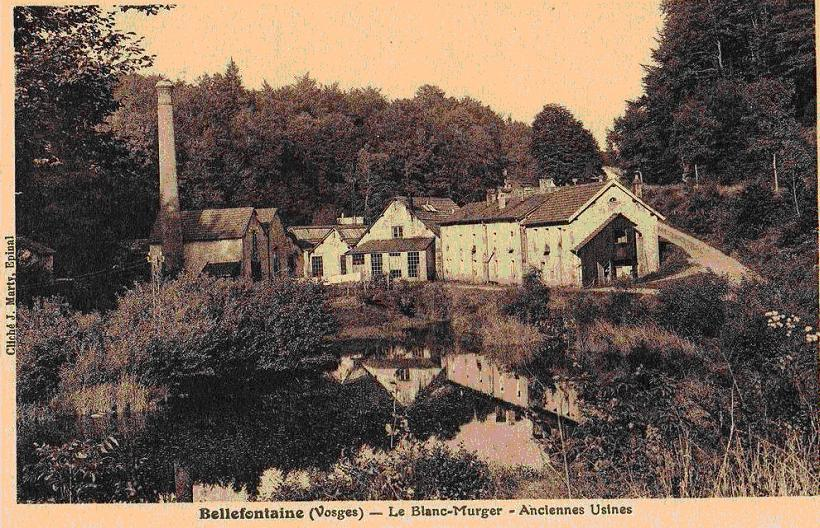 CPA Bellefontaine (88) - Anciennes usines du Blanc Murger (forges)